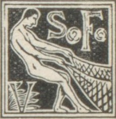 Otto Eckmann Signet S. Fischer Verlag